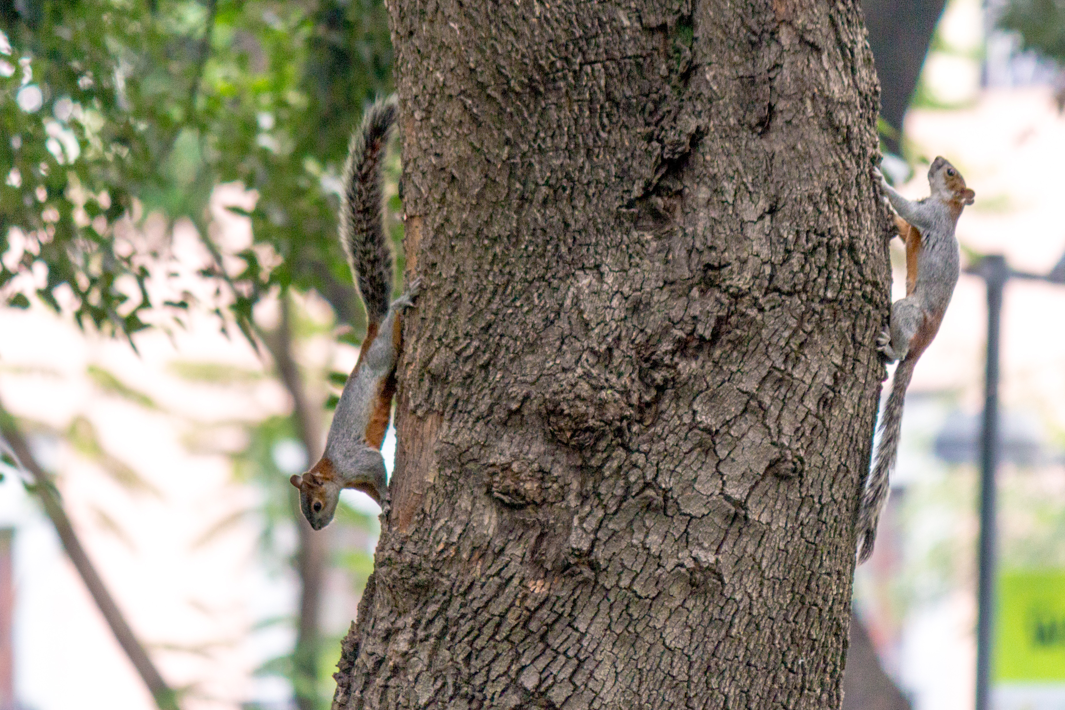 Rotbauchhörnchen